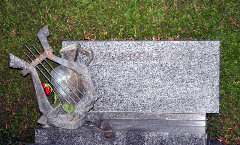 grob Vladimira Ruždjaka na Mirogoju u Zagrebu